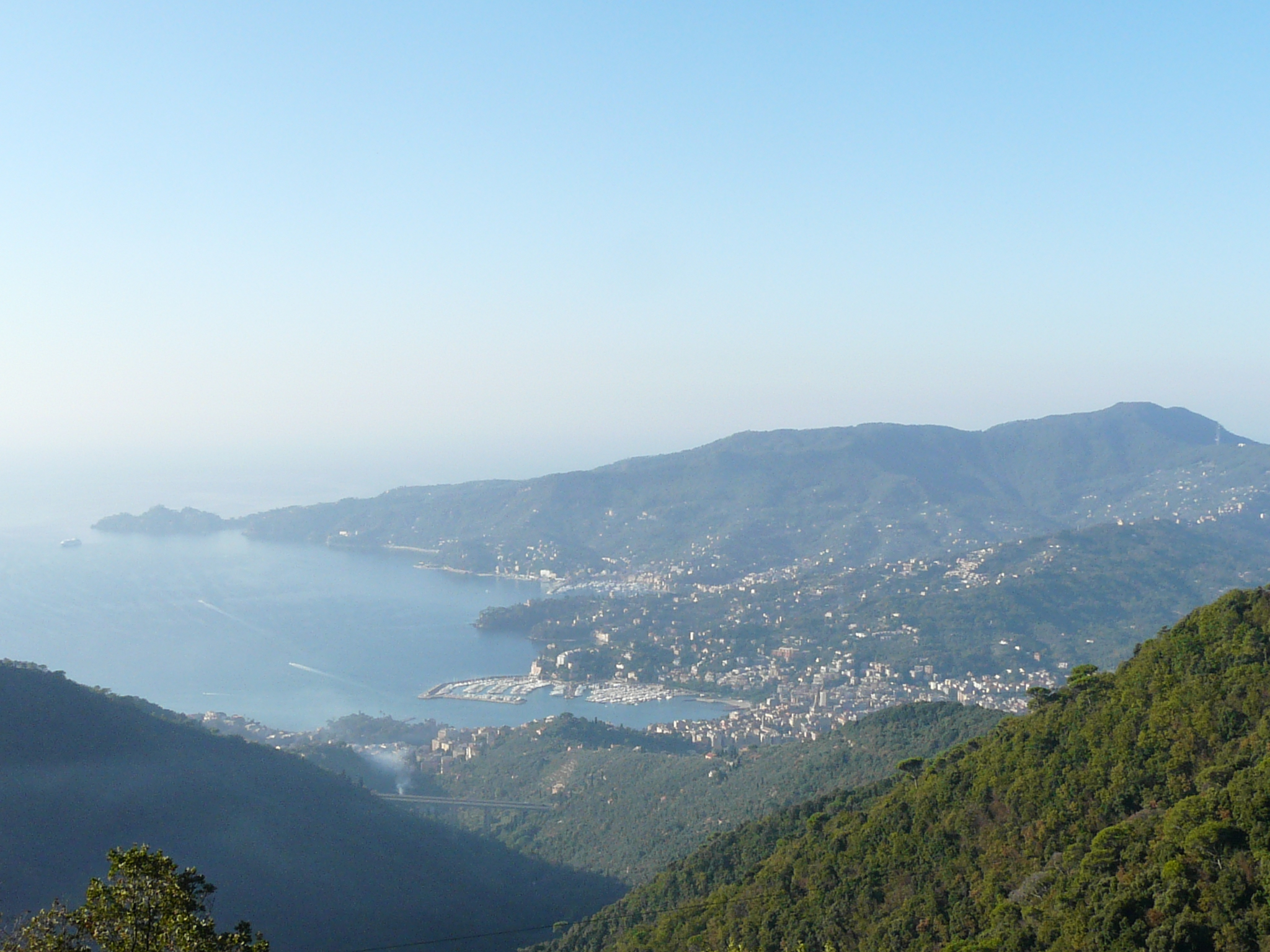 Panorama del Tigullio Occidentale dal Santuario di Nostra Signora di Montallegro, Rapallo, Liguria, Italia